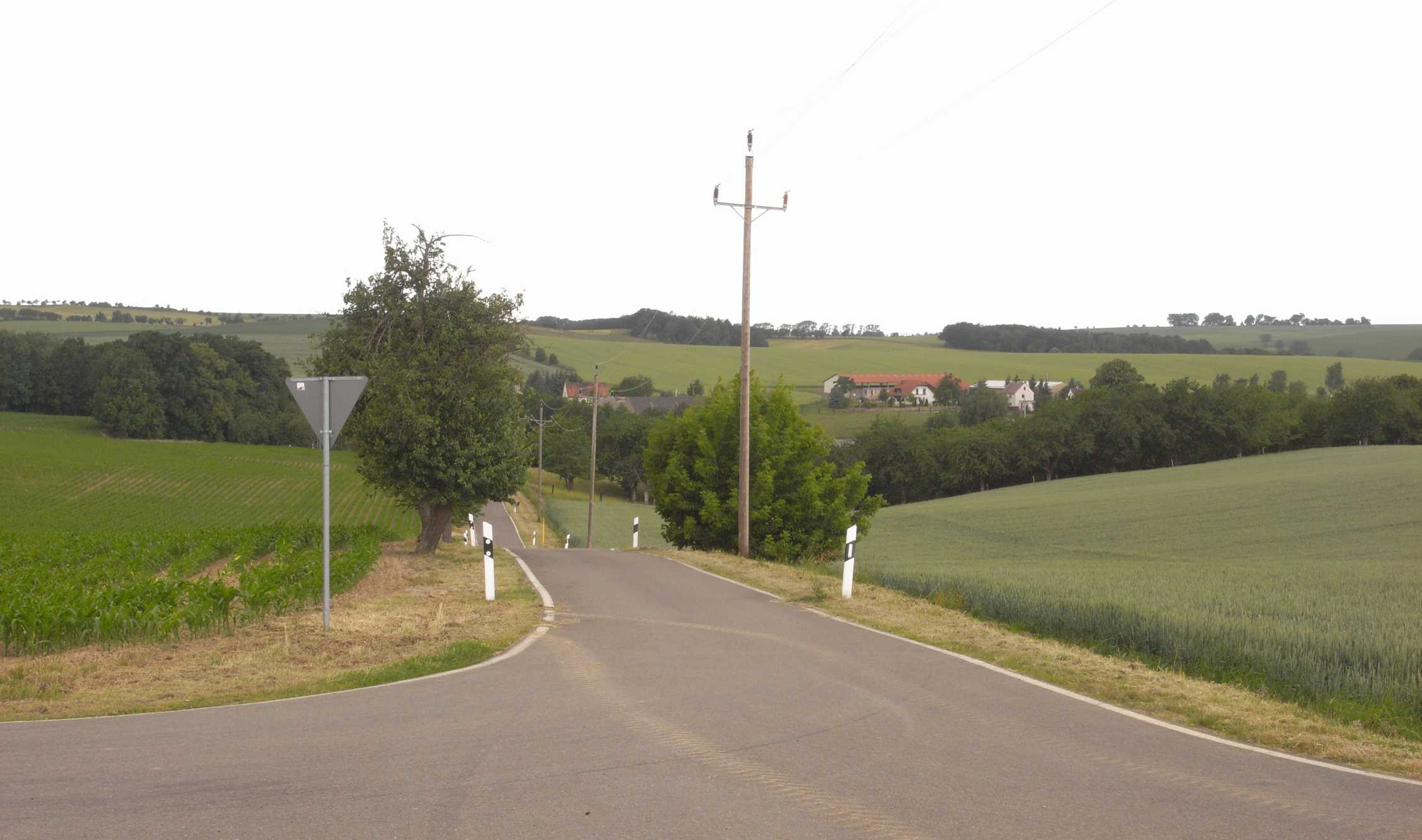 Blick auf Badersen (Deutschland, Sachsen)